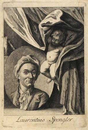 Lorenz Spengler (1720-1807). Engraving.